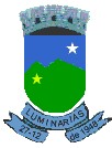 Brasão de Luminárias, MG